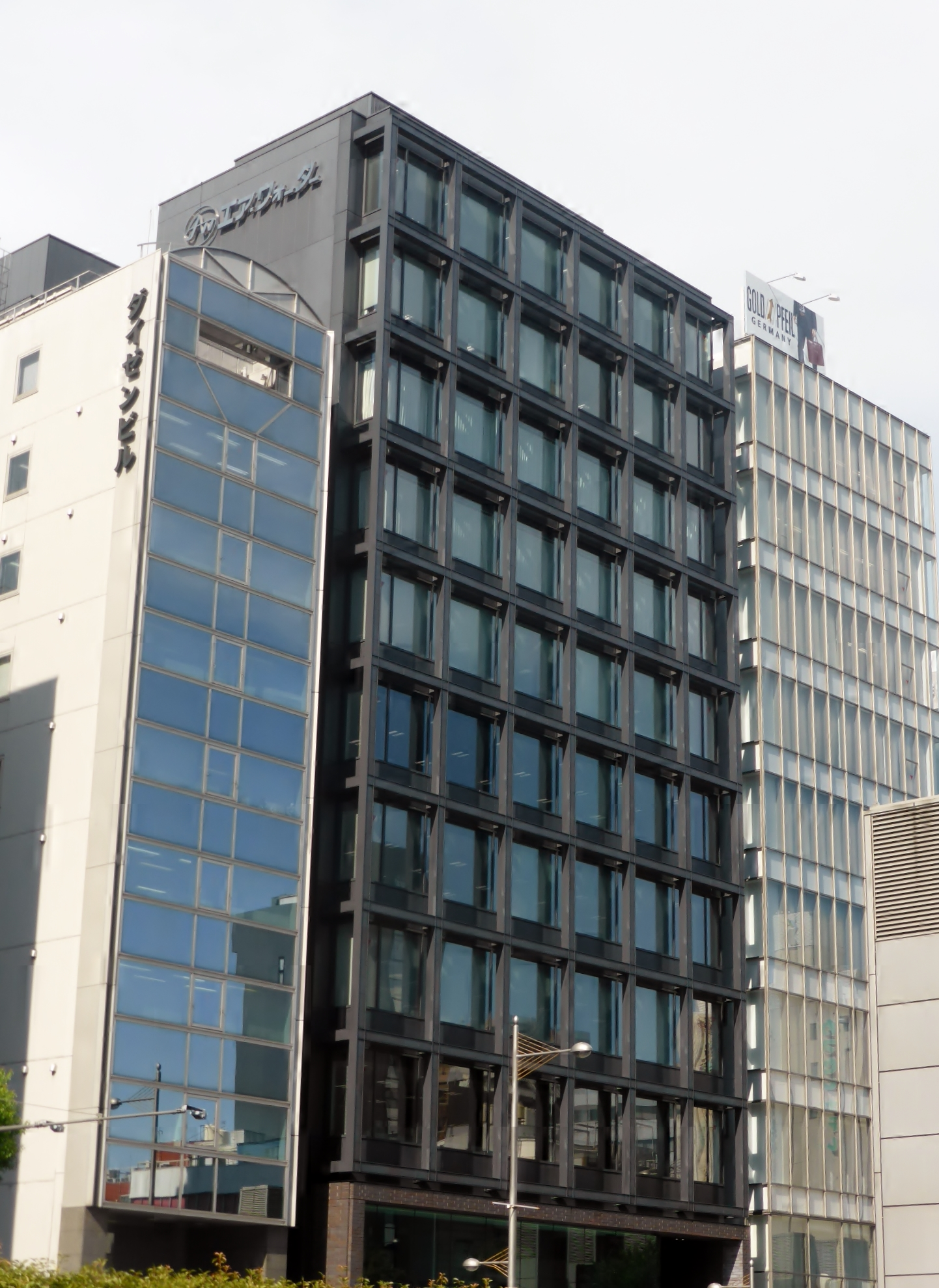 エアー・ウォータービルを撮影。